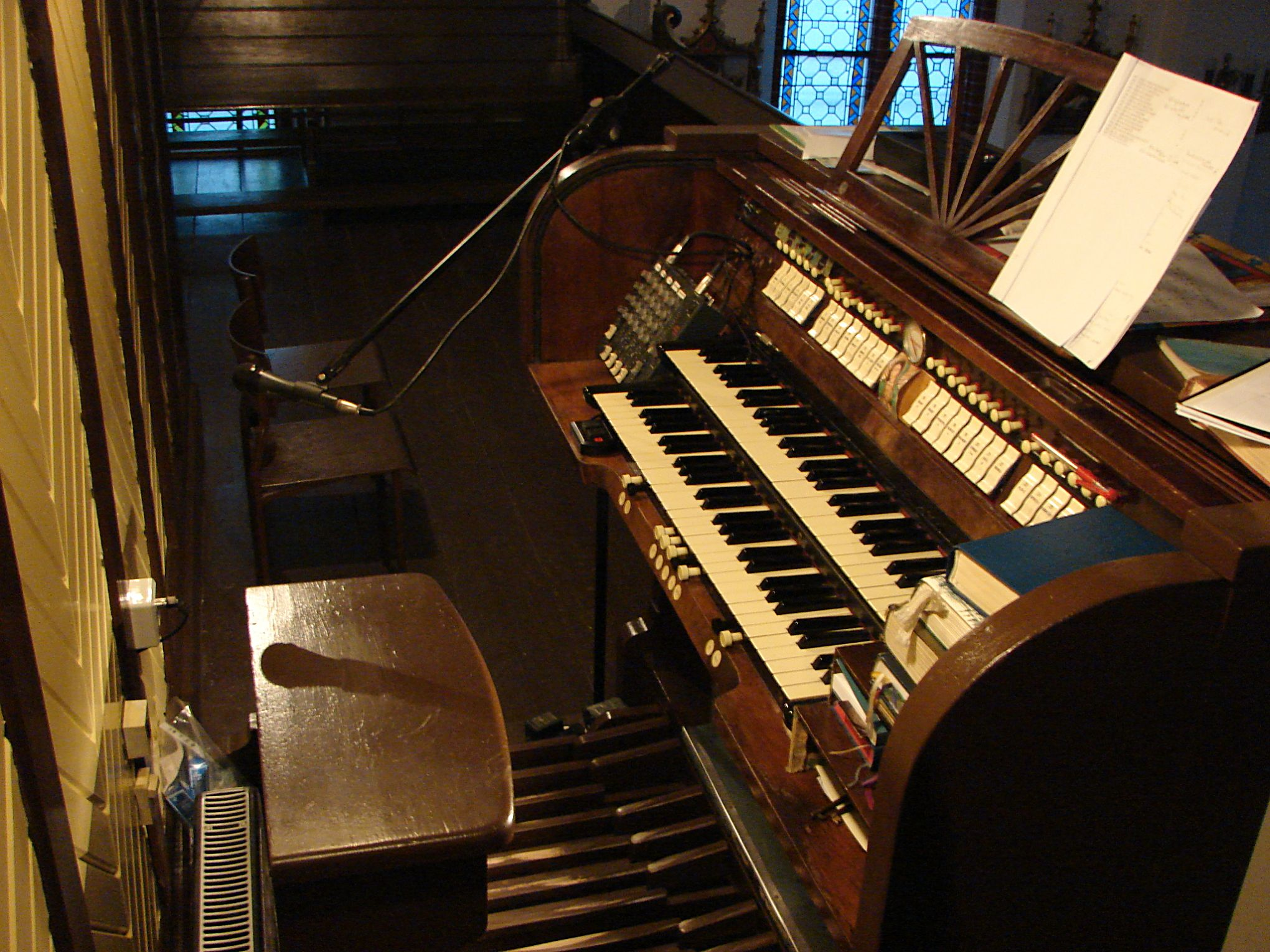 Kontuar organów kościoła św. Pawła w Elblągu